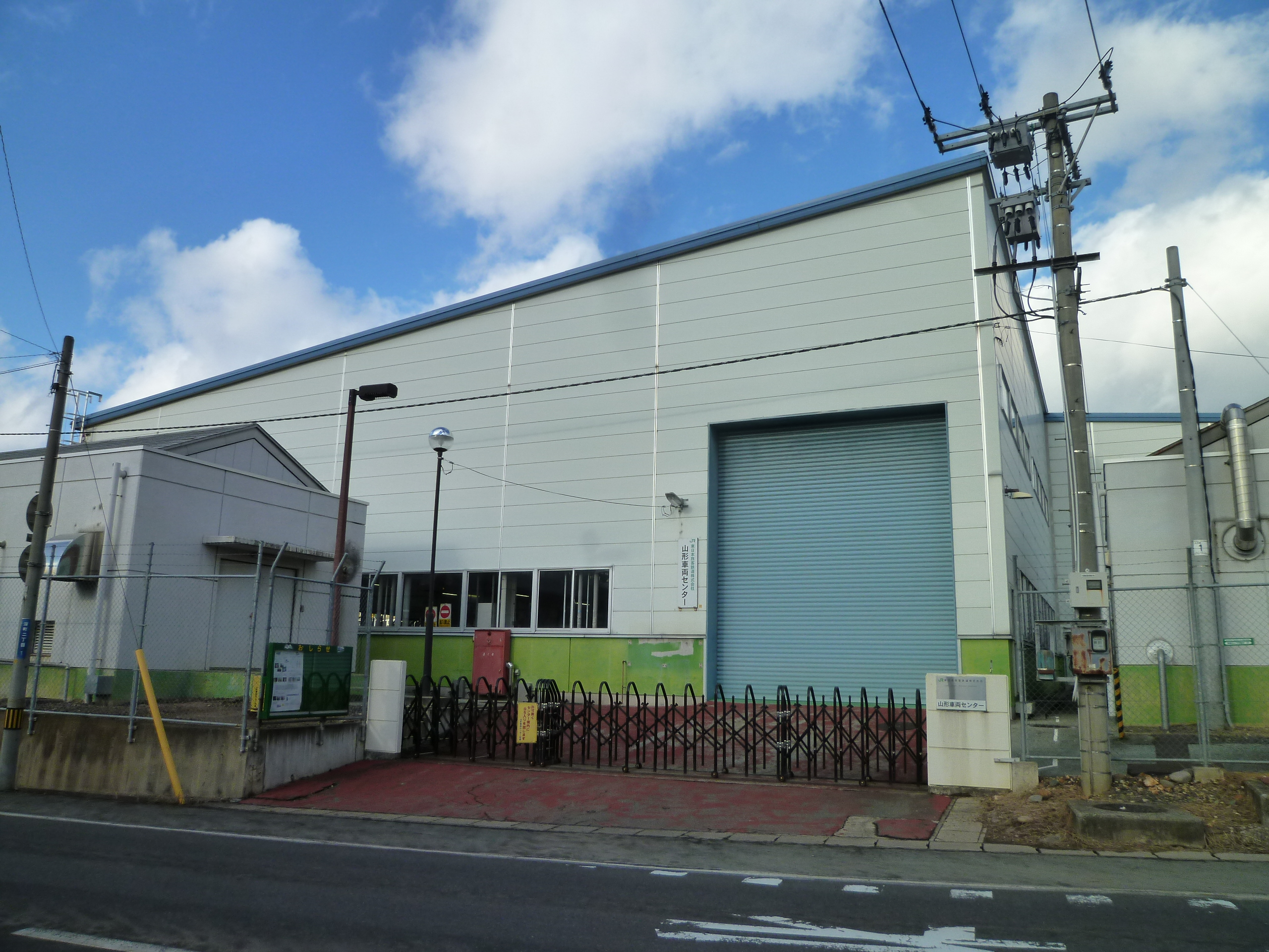 JR東日本山形車両センター。 山形県山形市深町に所在。